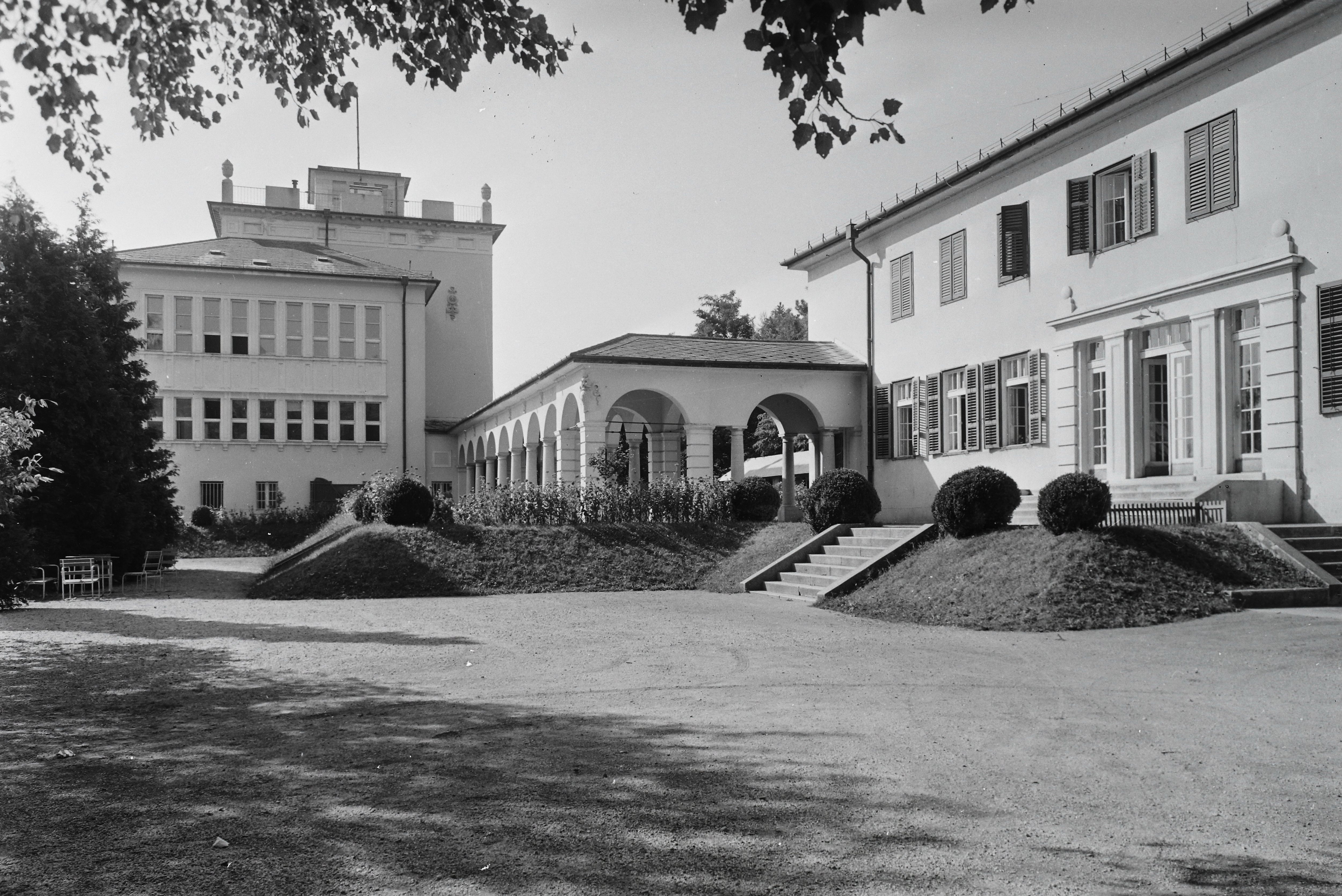 A BLI (Tihany) épülete Forrás: Fortepan